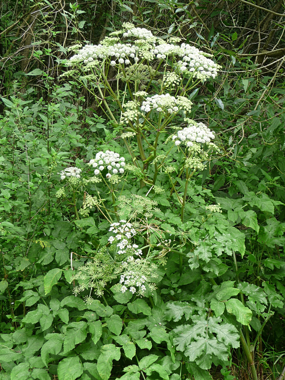 Arznei-Engelwurz am Scheureckerbach im Landschaftsschutzgebiet Kohlbruck